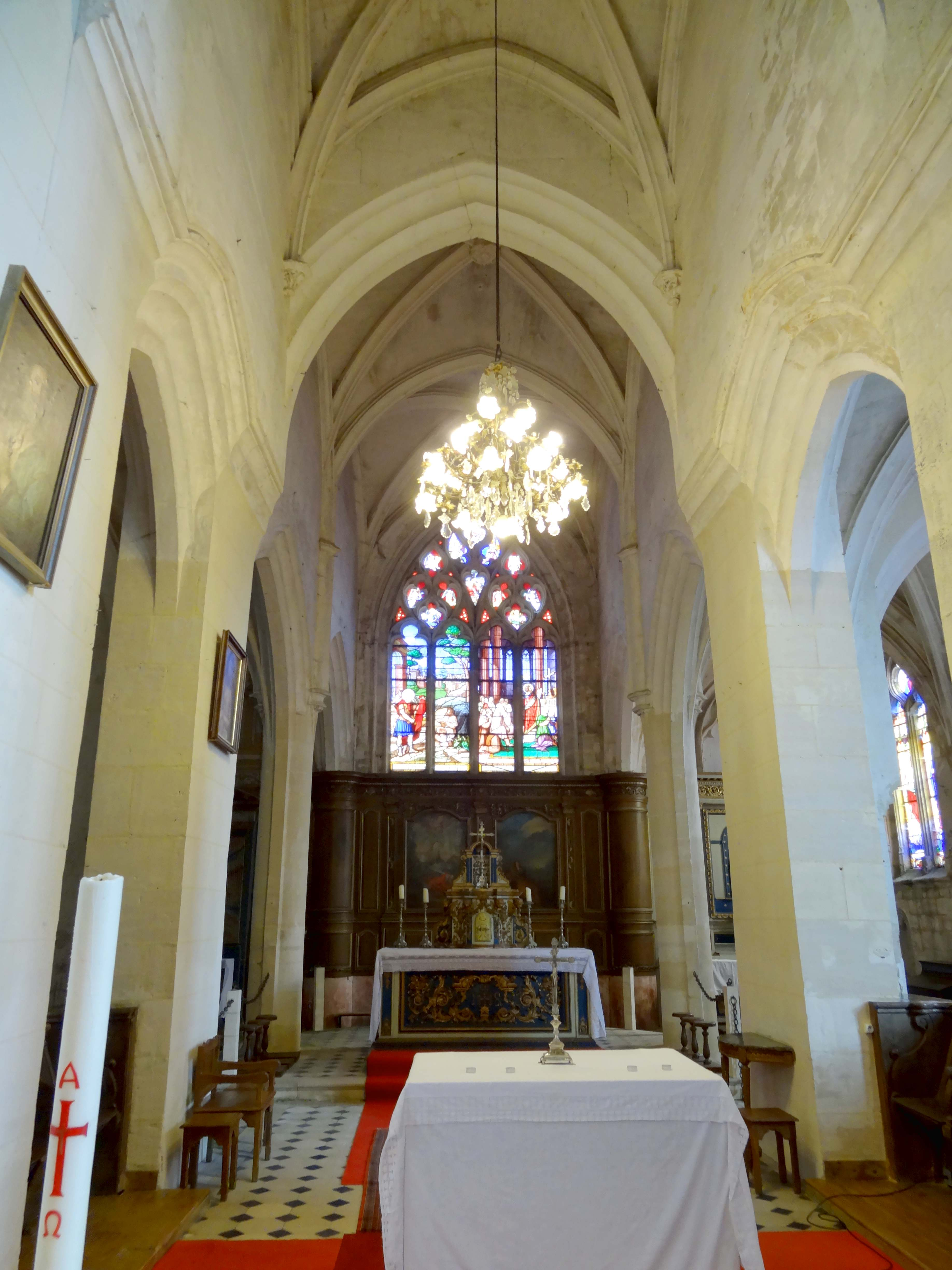 Intérieur de l'église - voir titre.